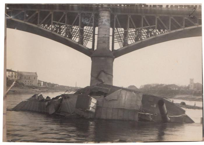 Параход «Надзея» пасля крушэння